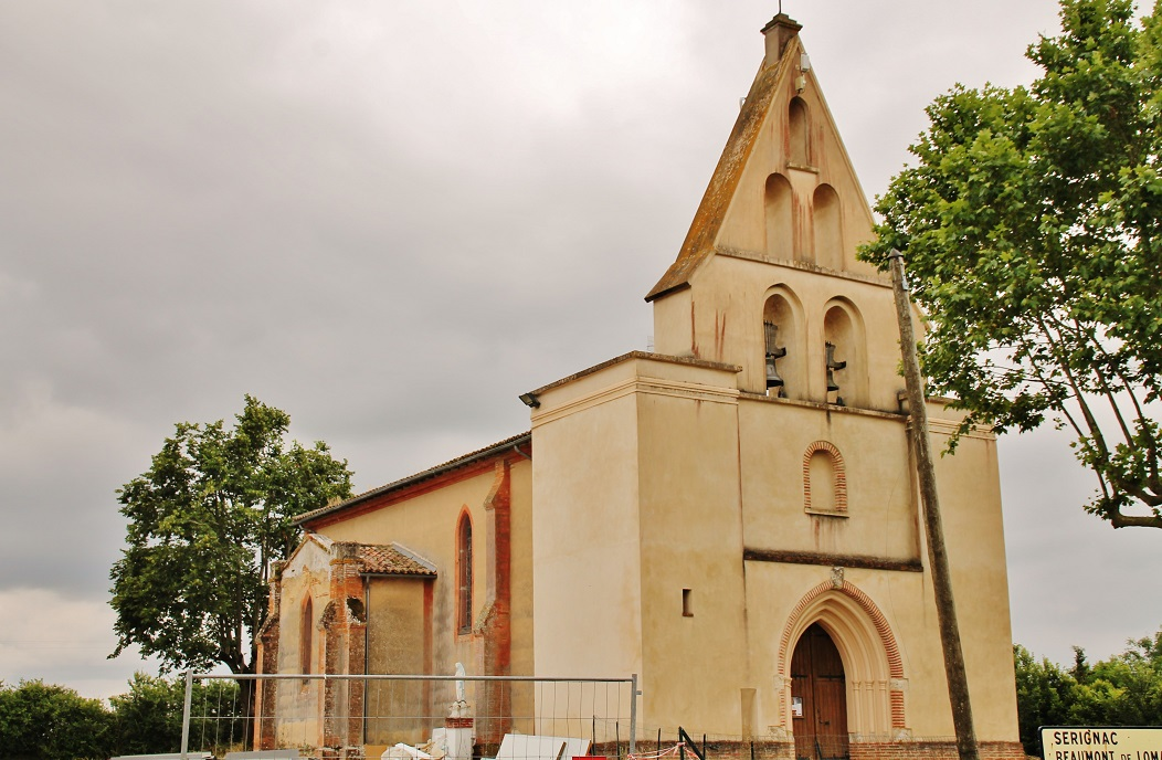 église St Barthelemy